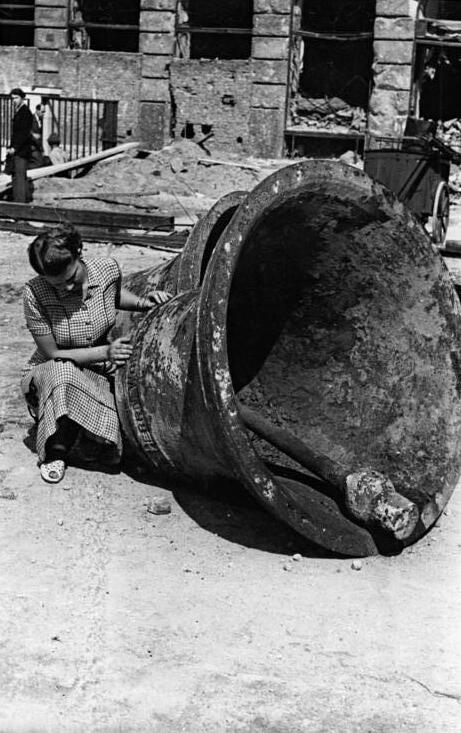 Berlin, Thälmannplatz, Glocke, Ruine Wahrscheinlich die Glocken der Dreifaltigkeitskirche UBz: Auf dem Thälmannplatz in Berlin liegen 2 alte Glocken, die bei Enttrümmerungsarbeiten zum Vorschein kamen. Aufn. Illus Kümpfel 7583-50 Leu. 16.8.50